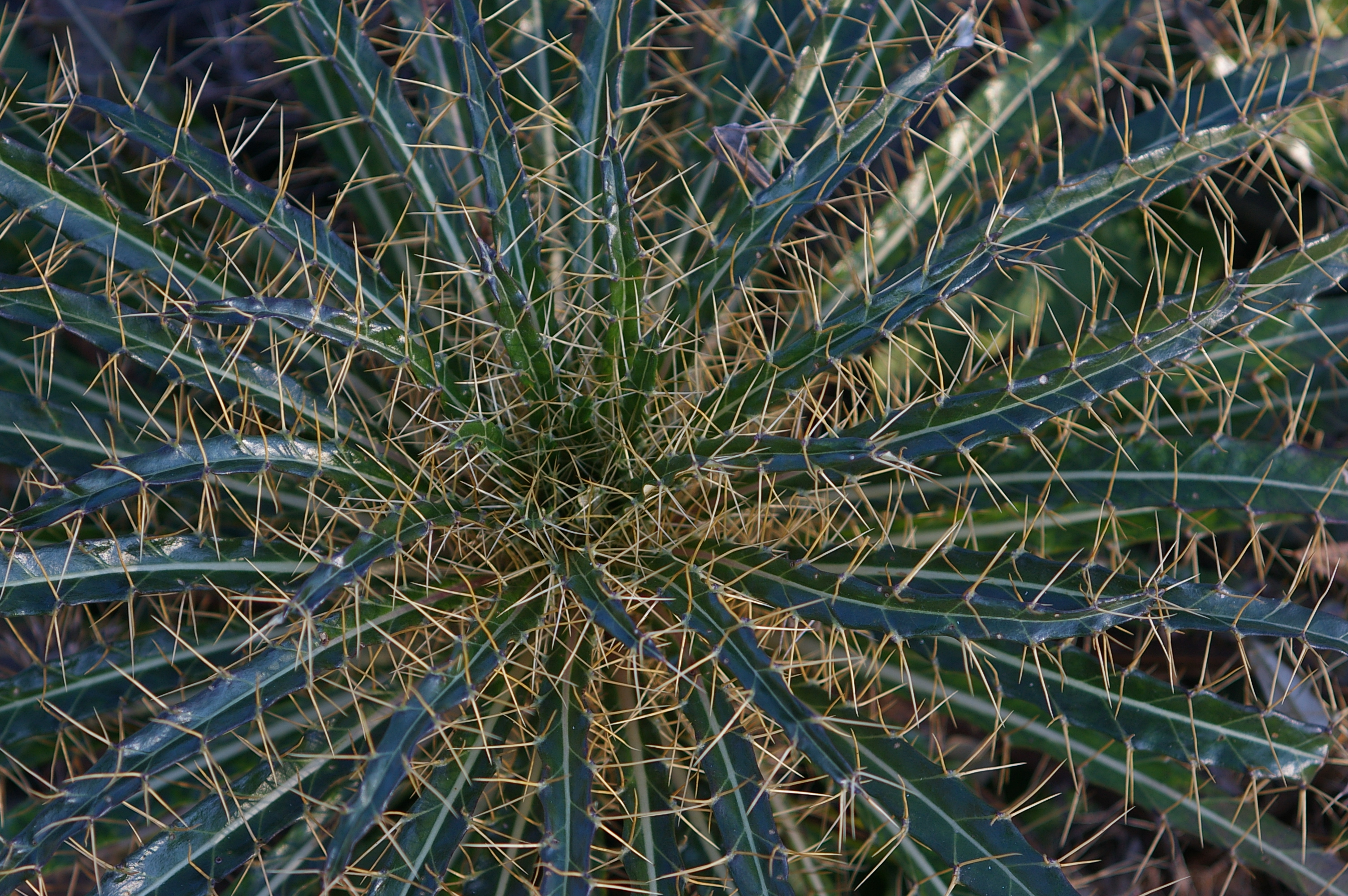 Ptilostemon casabonae (L.) Greuter - Chardon de Casabona Jardin Alpin du Jardin des Plantes, Paris.